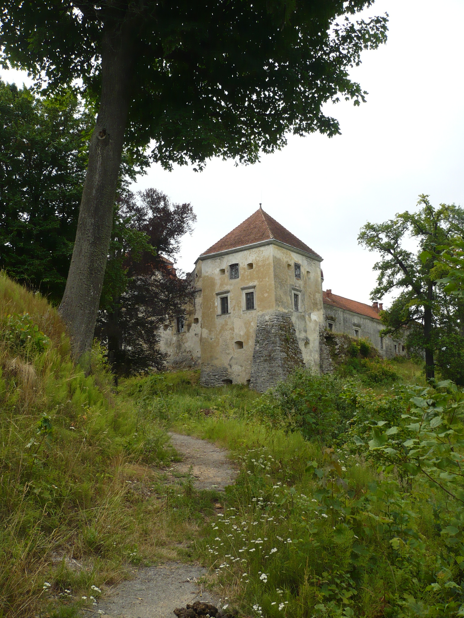 Wieża zamku w Świrzu na Ukrainie. Zamek stanowił pierwotnie własność książąt Świrskich, od XVII wieku należał do rodu Cetnerów, zniszczony podczas wojen kozackich w 1648, zdobyty przez Turków w 1672. Po pierwszym rozbiorze Rzeczypospolitej znalazł się na obszarze zaboru austriackiego. Ostatnimi właścicielami przed 1939 byli Irena z Lamezanów i jej mąż Tadeusz Komorowski, późniejszy dowódca Armii Krajowej i powstania warszawskiego